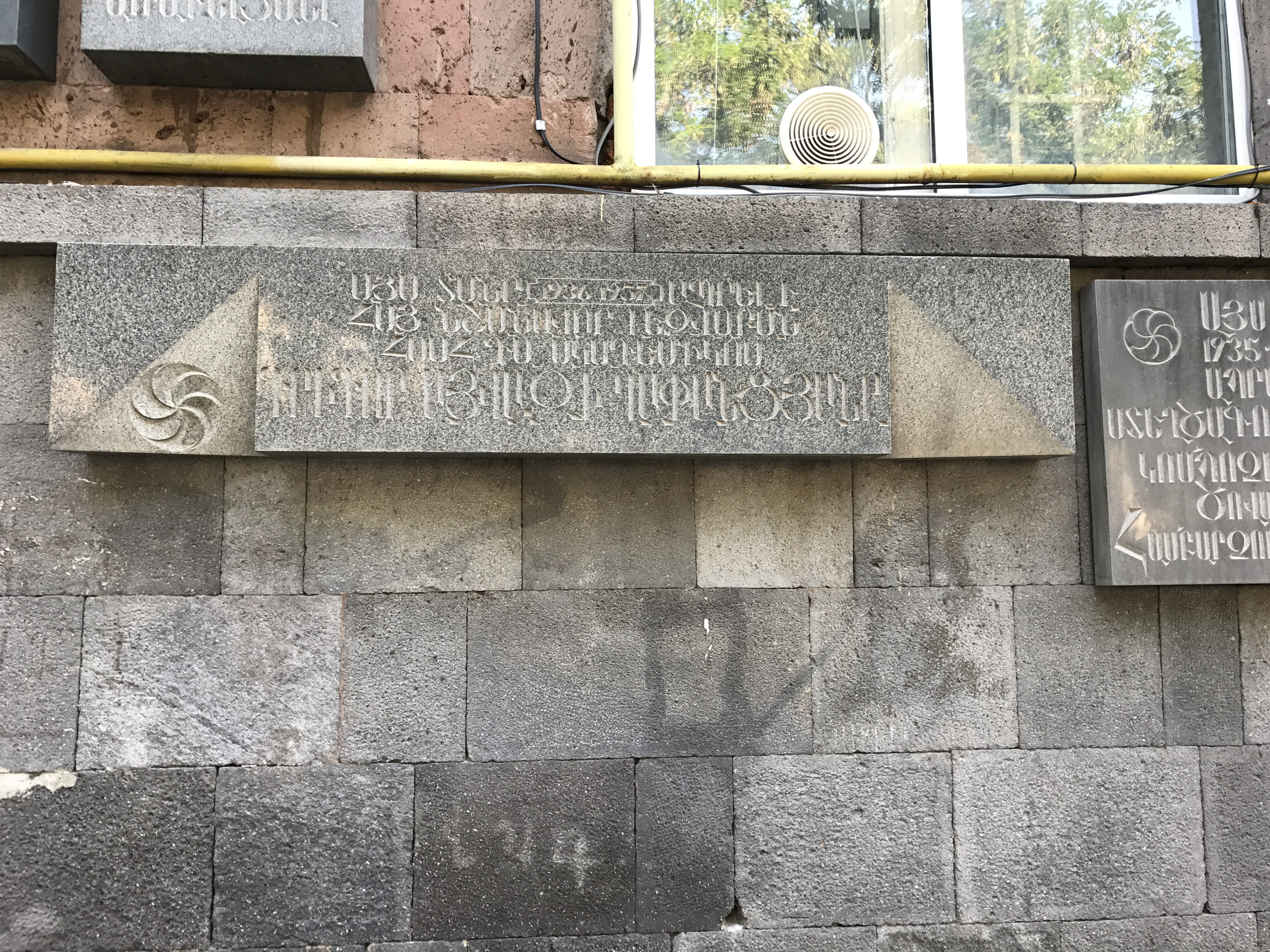 Image d'Arménie en juillet 2017.